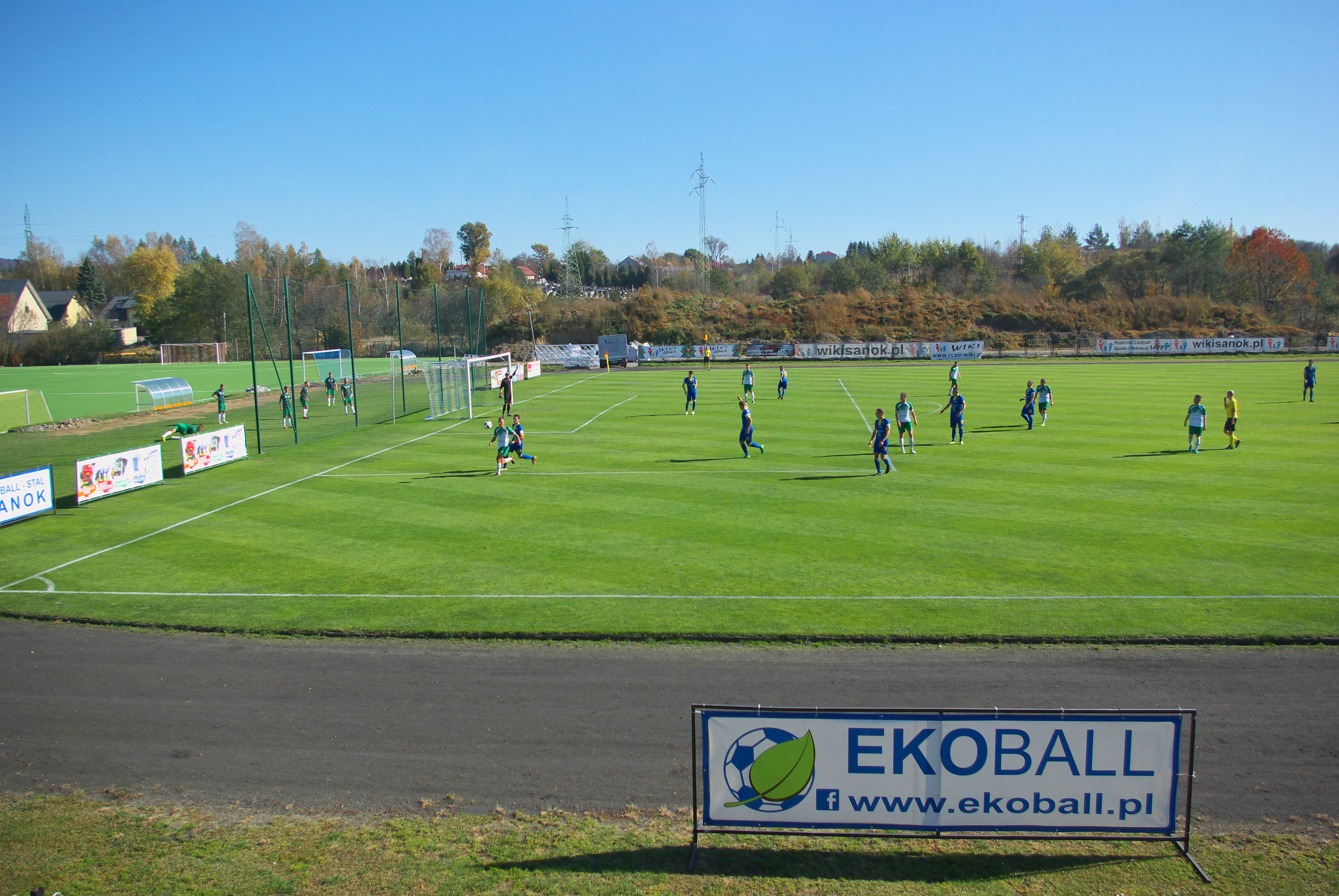 Stadion przy ul. Stróżowskiej w Sanoku. Mecz Ekoball Stal Sanok - Izolator Boguchwała 13 października 2018 (2:2).